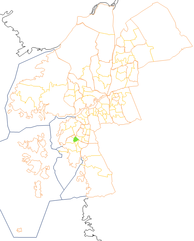 Karta som visar primärområdes belägenhet i Göteborg